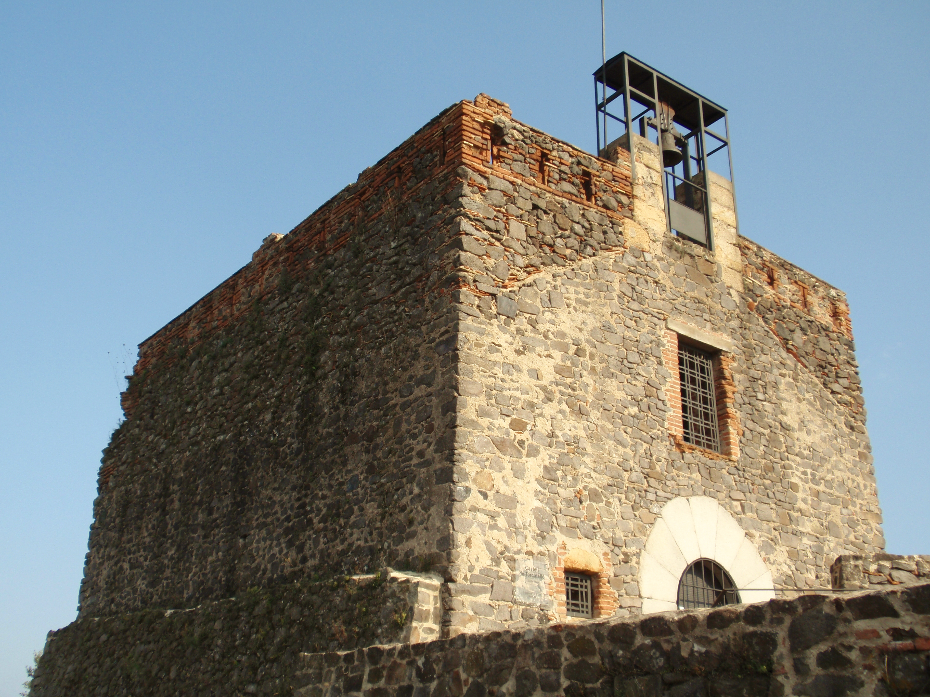 Castell de Torcafelló (Maçanet de la Selva). Capella de Sant Jordi